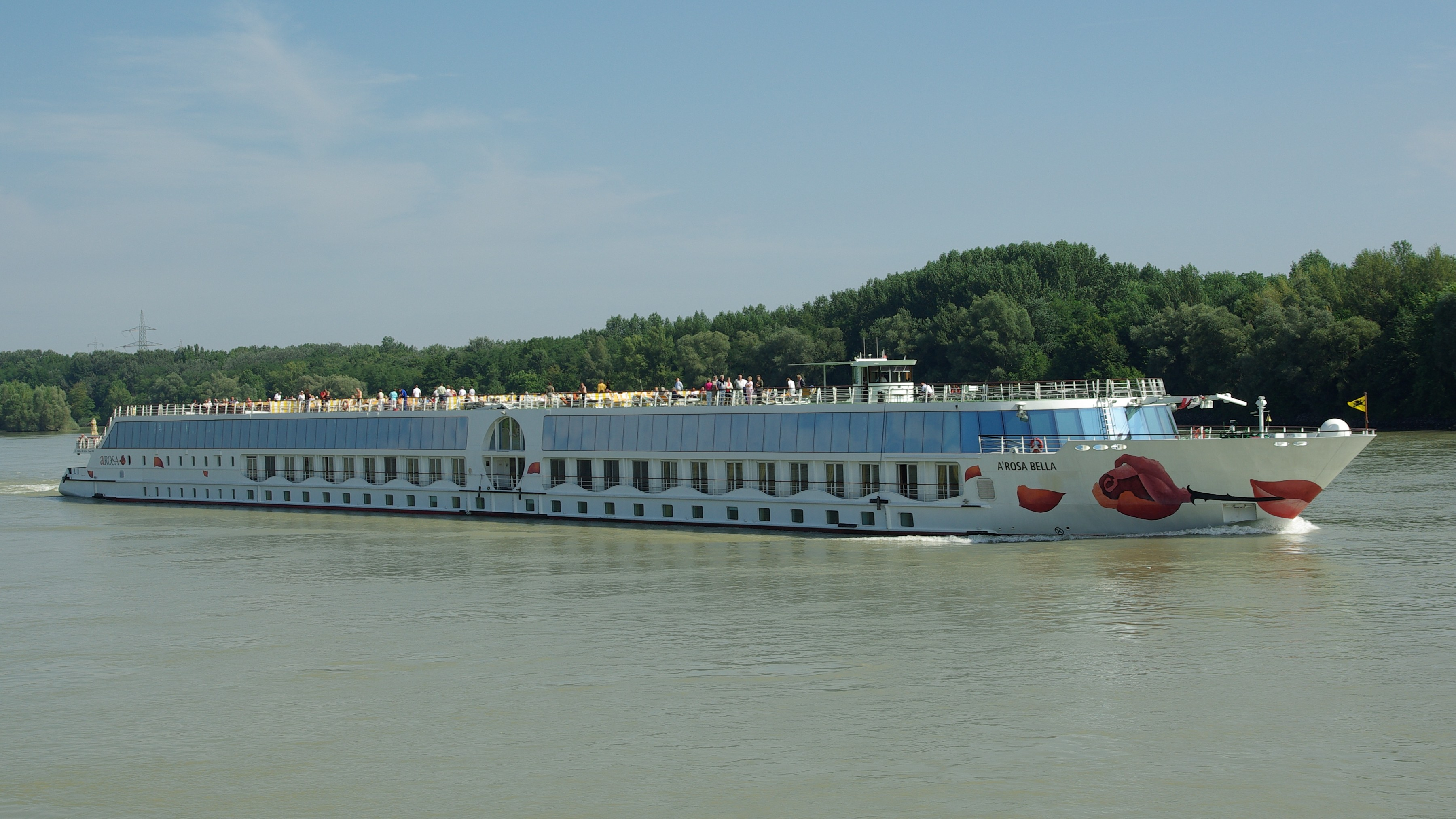 Das Passagierschiff A'Rosa Bella auf der Donau in Niederösterreich.